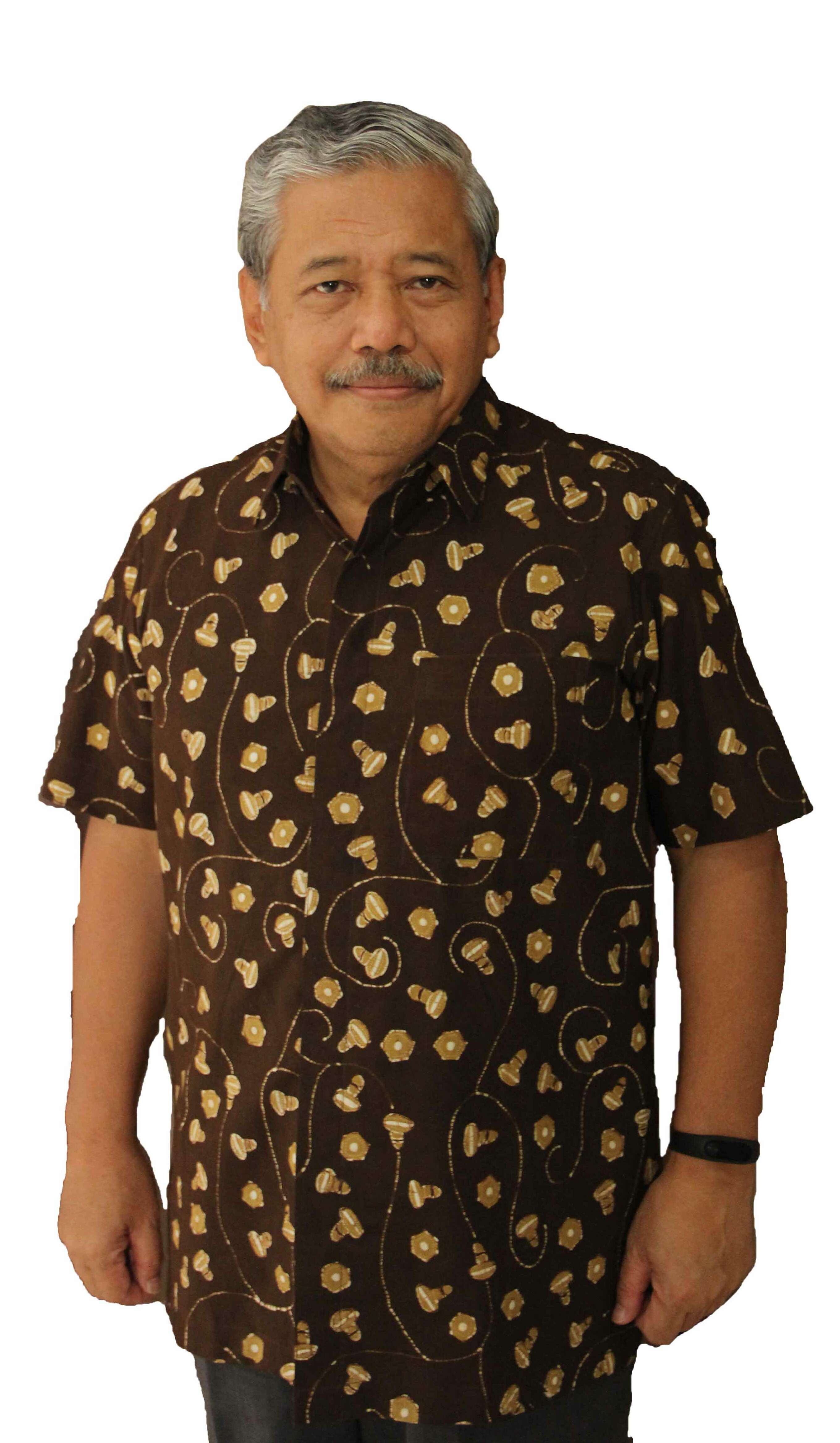 Indonesia